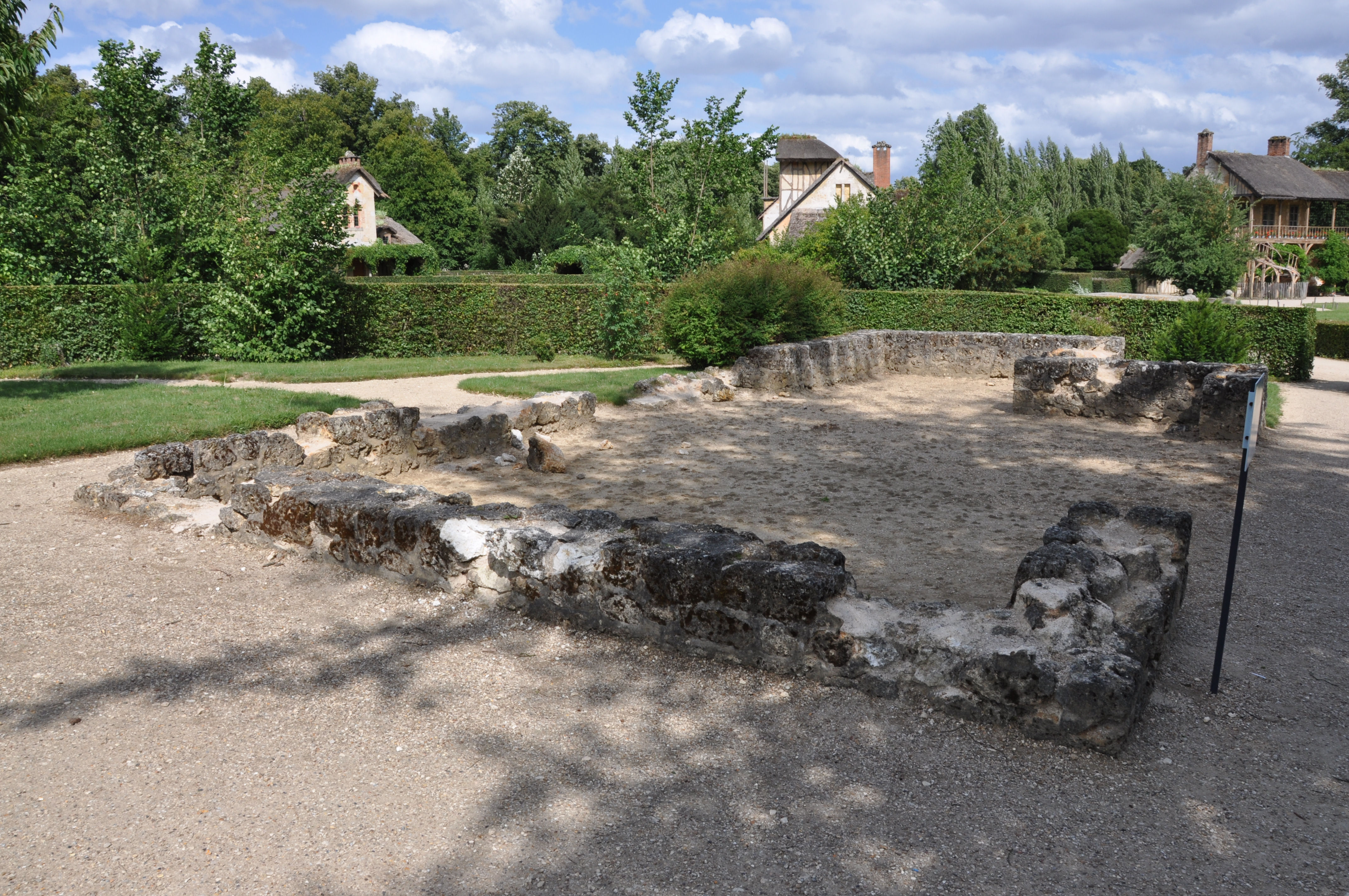 Emplacement de l'ancienne laiterie de préparation du hameau de la Reine